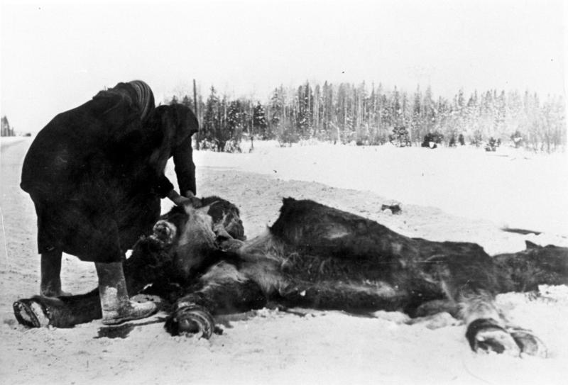 Sowjetunion, Ausschlachten eines Pferdes An der Sowjetfront: Erlebnisse an der Vormarschstraße.- Hunger tut weh, Ausschlachten eines Pferdes.